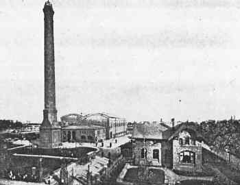 Erste Müllverbrennungsanlage Deutschlands am Bullerdeich in Hamburg-Hammerbrook; Germanys first waste incineration plant